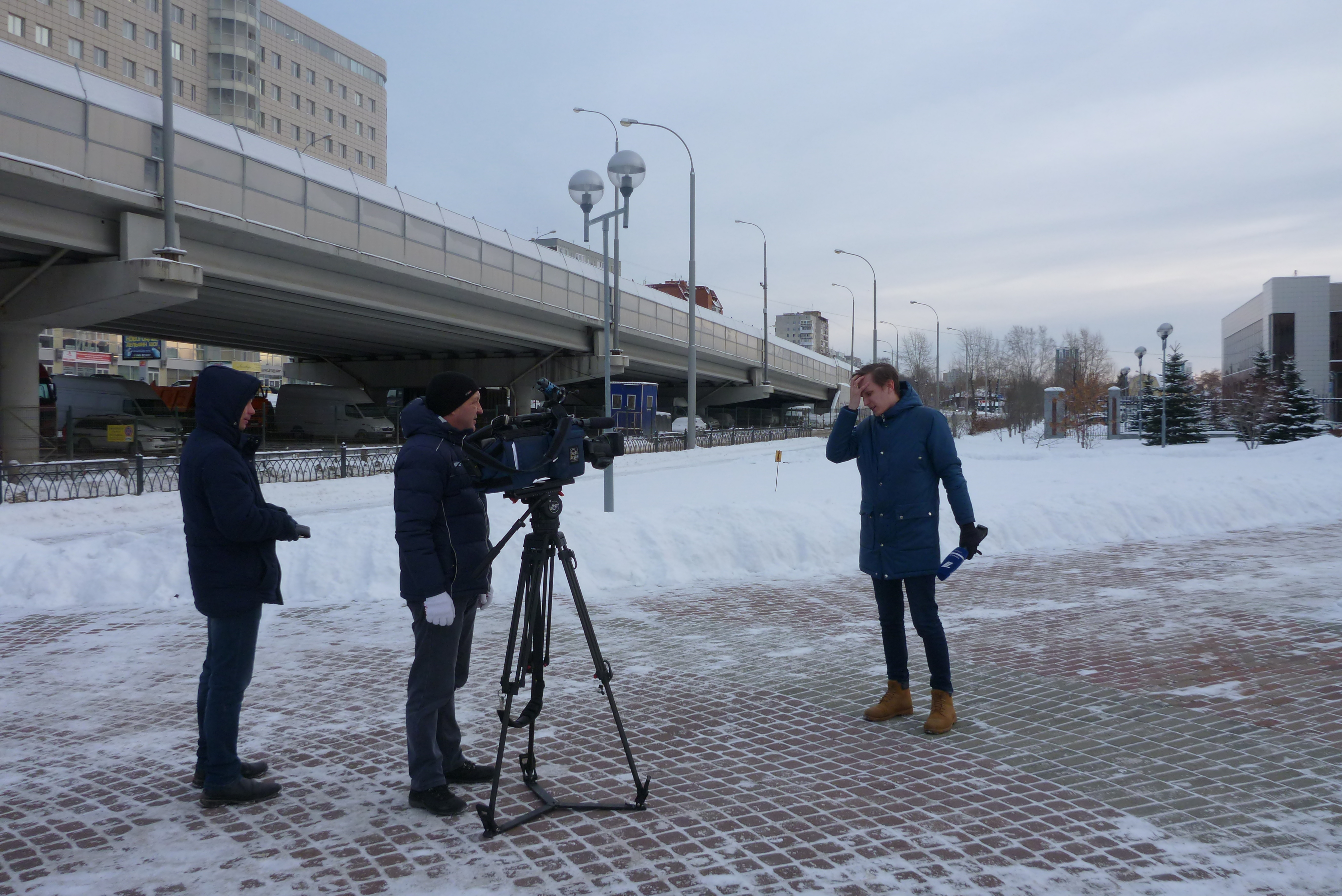 Съемочная группа Первого канала в Екатеринбурге 21 января 2019 года